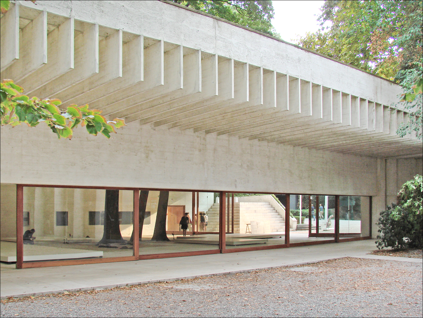 L'extérieur du pavillon des pays nordiques lors de la biennale 2011 (architecte : Sverre Fehn, Norvège) le pavillon sur MIMOA Photo Annie Dalbéra voir le pavillon sous un autre angle